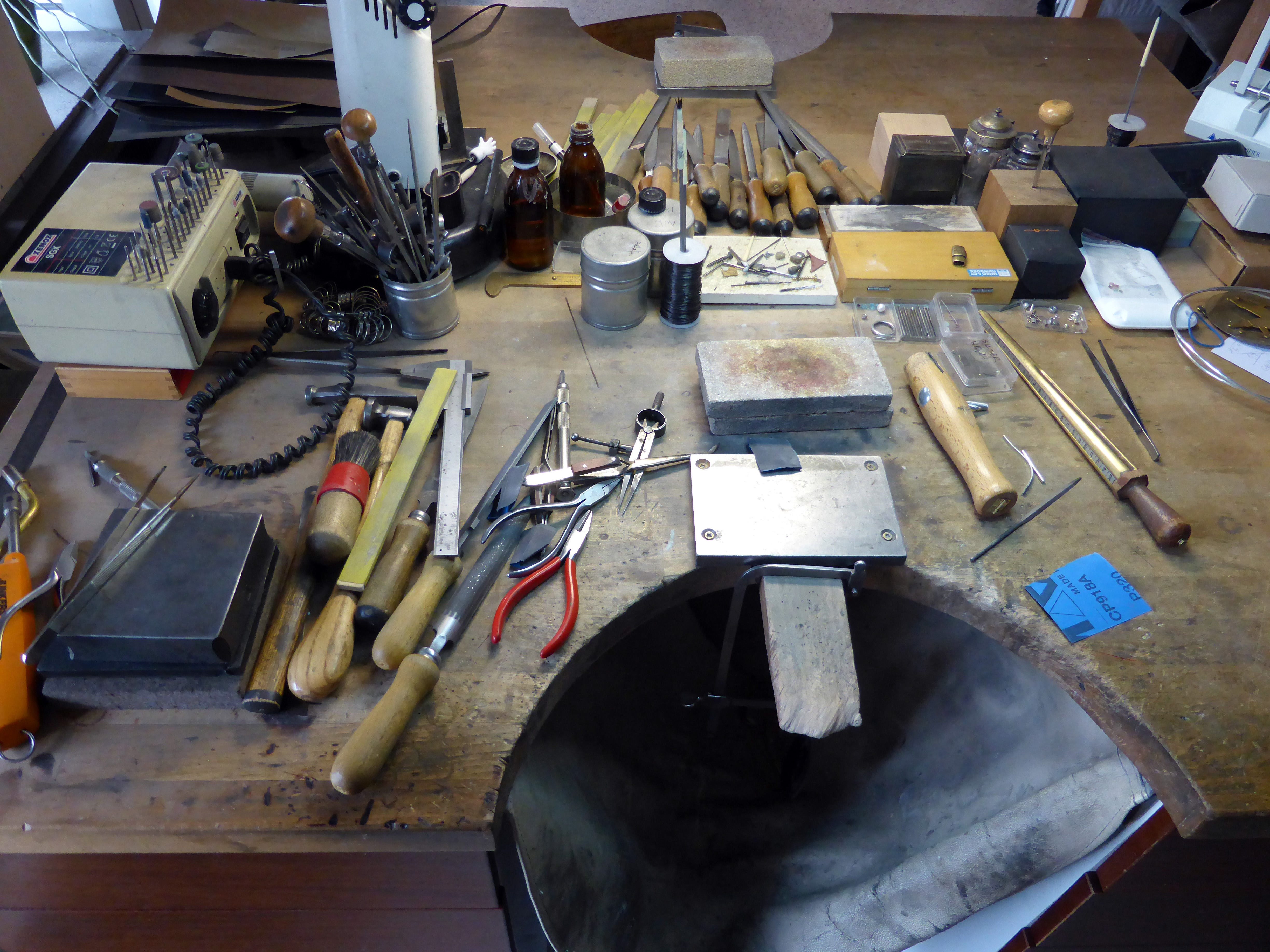 Goldschmiede, Werkbrett des Künstlers Terrumanum, Köln